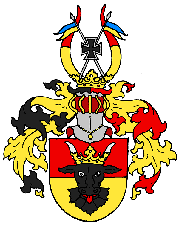 Wappen der Familie von Mecklenburg (1871).